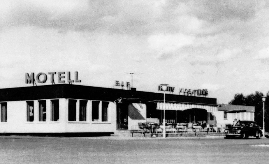 Sävsta Motell hade även verkstad och bensinstation som drevs av Shell. Det öppnades på hösten 1958 och lades ner 1989